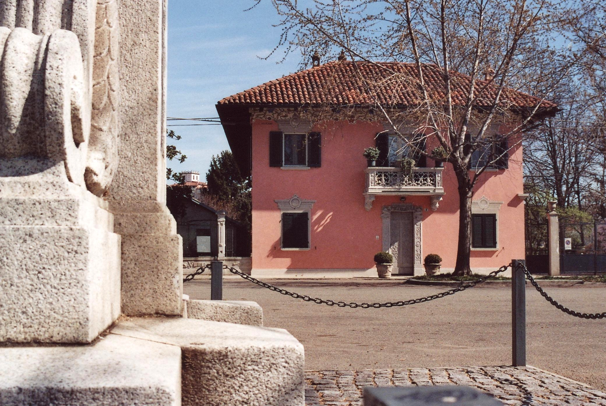 Fara Novarese (NO), Casa Portigliotti, facciata.